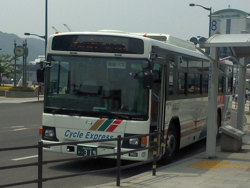 しまなみサイクルエクスプレス